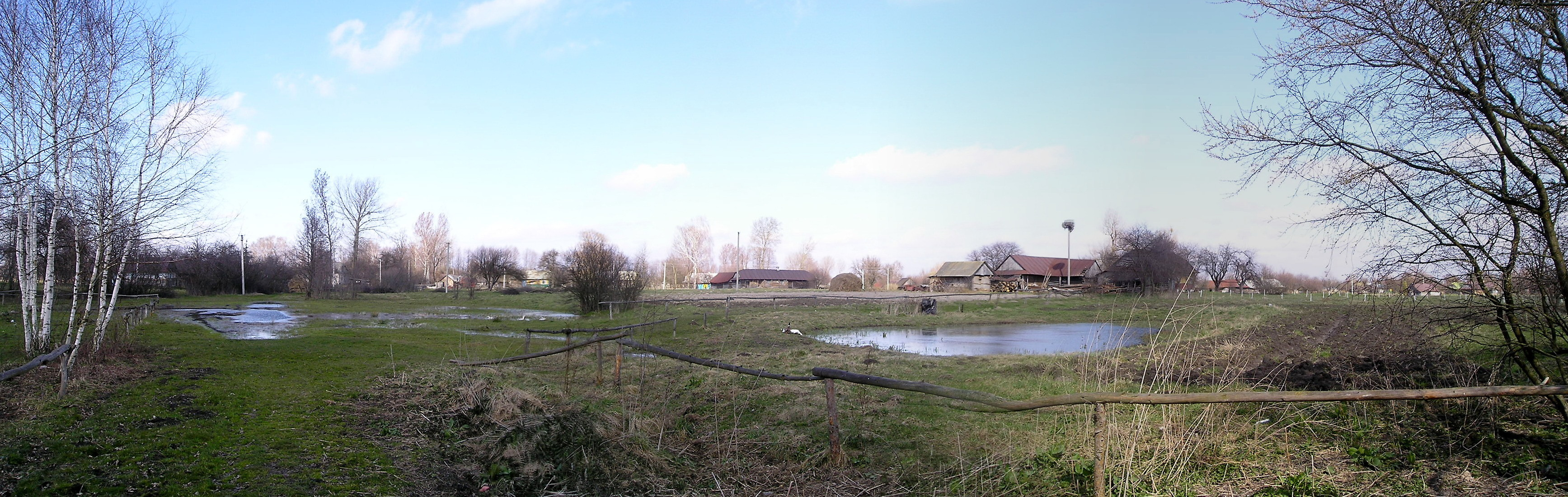 Ukraine-Volun oblast-KaminKashyrskyi raion-Luchunu village